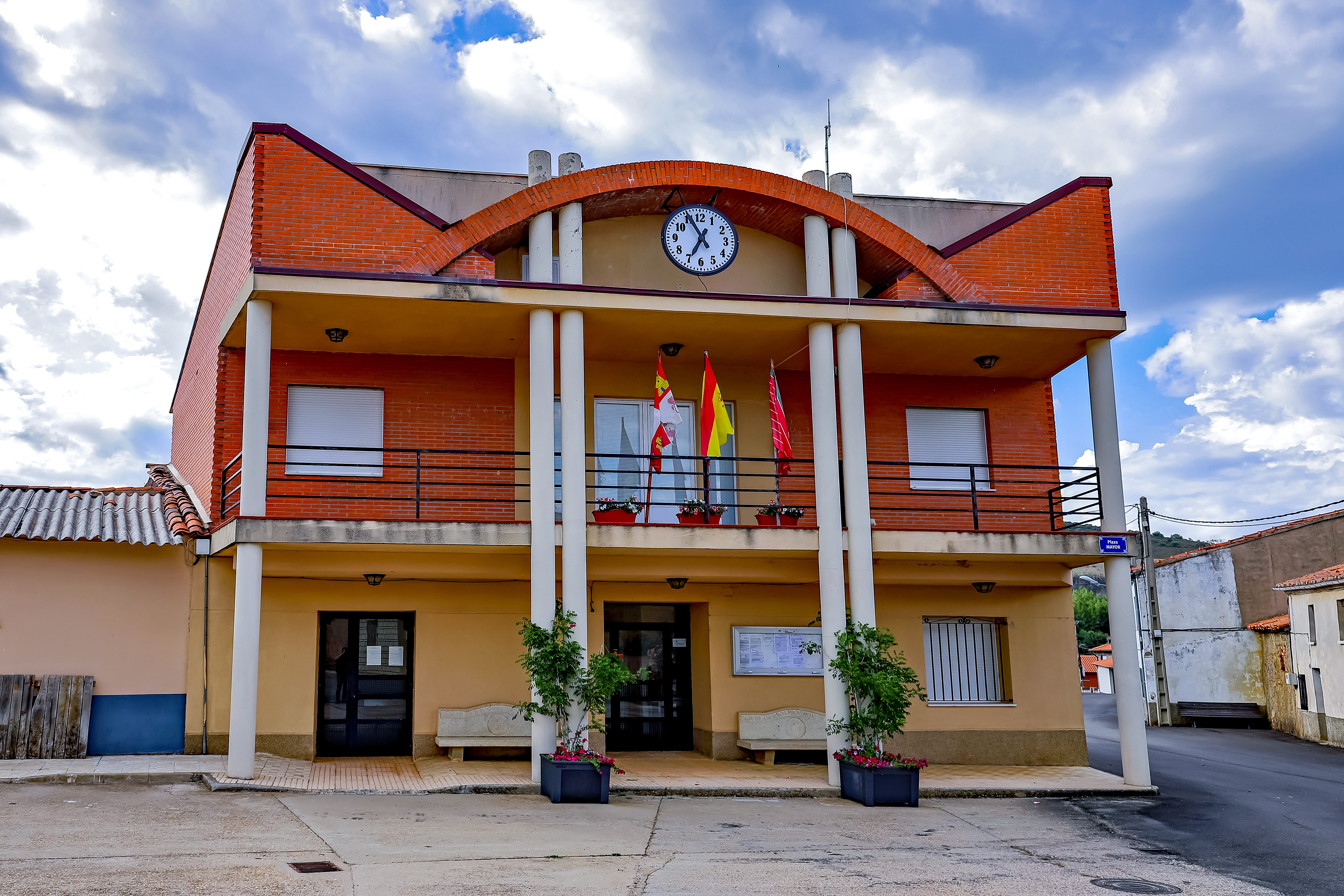 tero de Bodas es un municipio de la comarca de La Carballeda, en la provincia de Zamora.